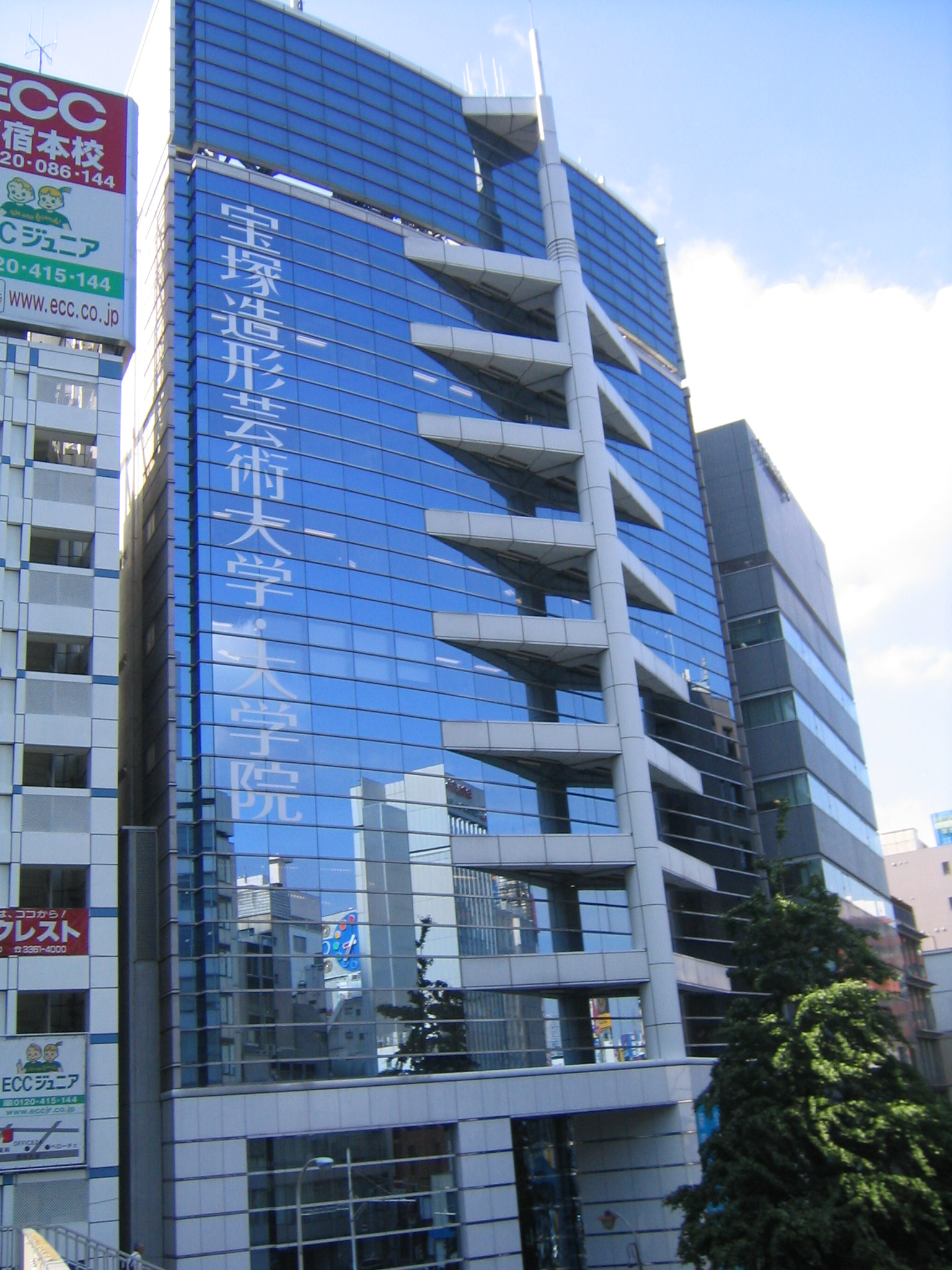 宝塚造形芸術大新宿キャンパス